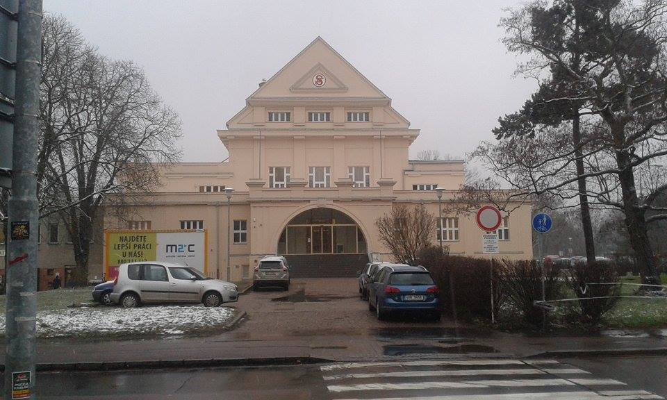 po rekonstrukci roku 2016